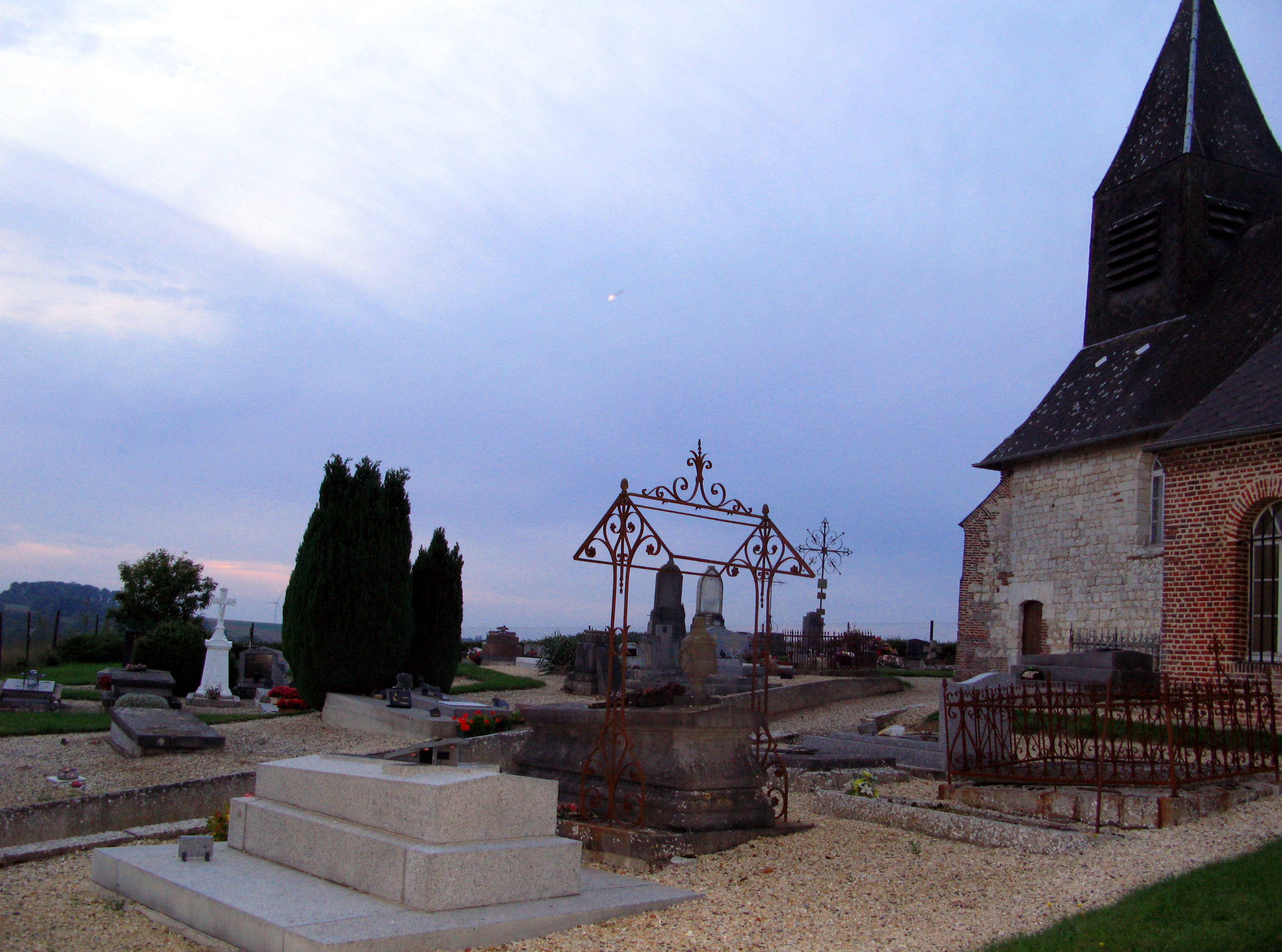 Berlise (Aisne, France) - L'église fortifiée, entourée de son cimetière, domine le paysage. On remarque d'anciennes tombes décorées de structures en fer forgé. Ces grilles, ces crucifix, ces petits toits, fort rouillés, parfois en déséquilibre, sont typiques d'une "mode" très en vogue dans la deuxième moitié du 19ème siècle. Il est dommage qu'ici comme ailleurs elles ne soient pas entretenues, comme simples témoins du patrimoine relatif à un art funéraire en péril. Au centre, par exemple, le petit toit à 2 pans était à l'origine équipé de vitres sur chaque versant.